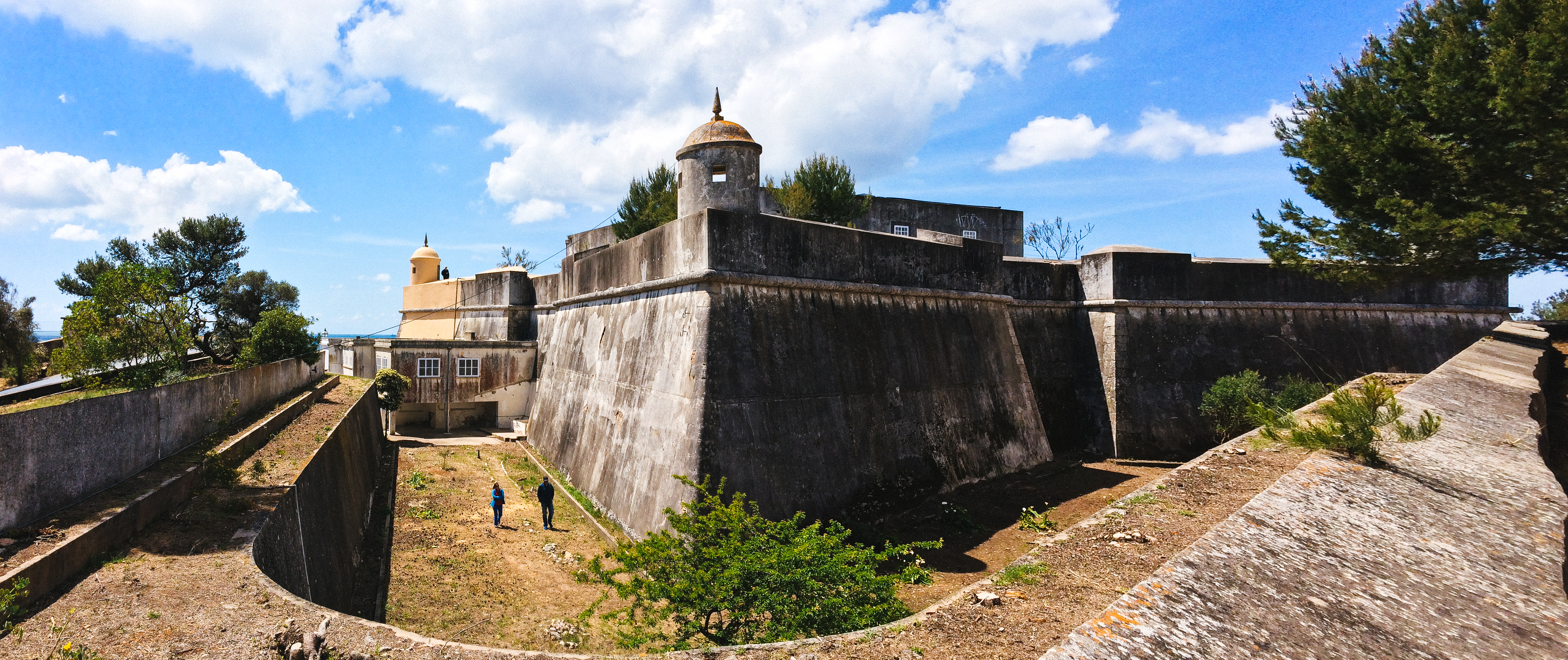 Forte de Santo António da Barra